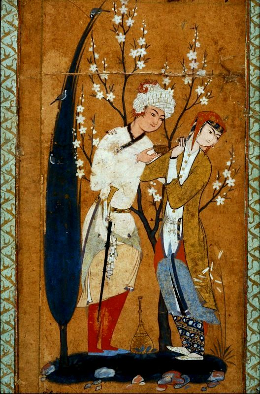 Мухаммади. Влюбленные у ручья Boston MFA